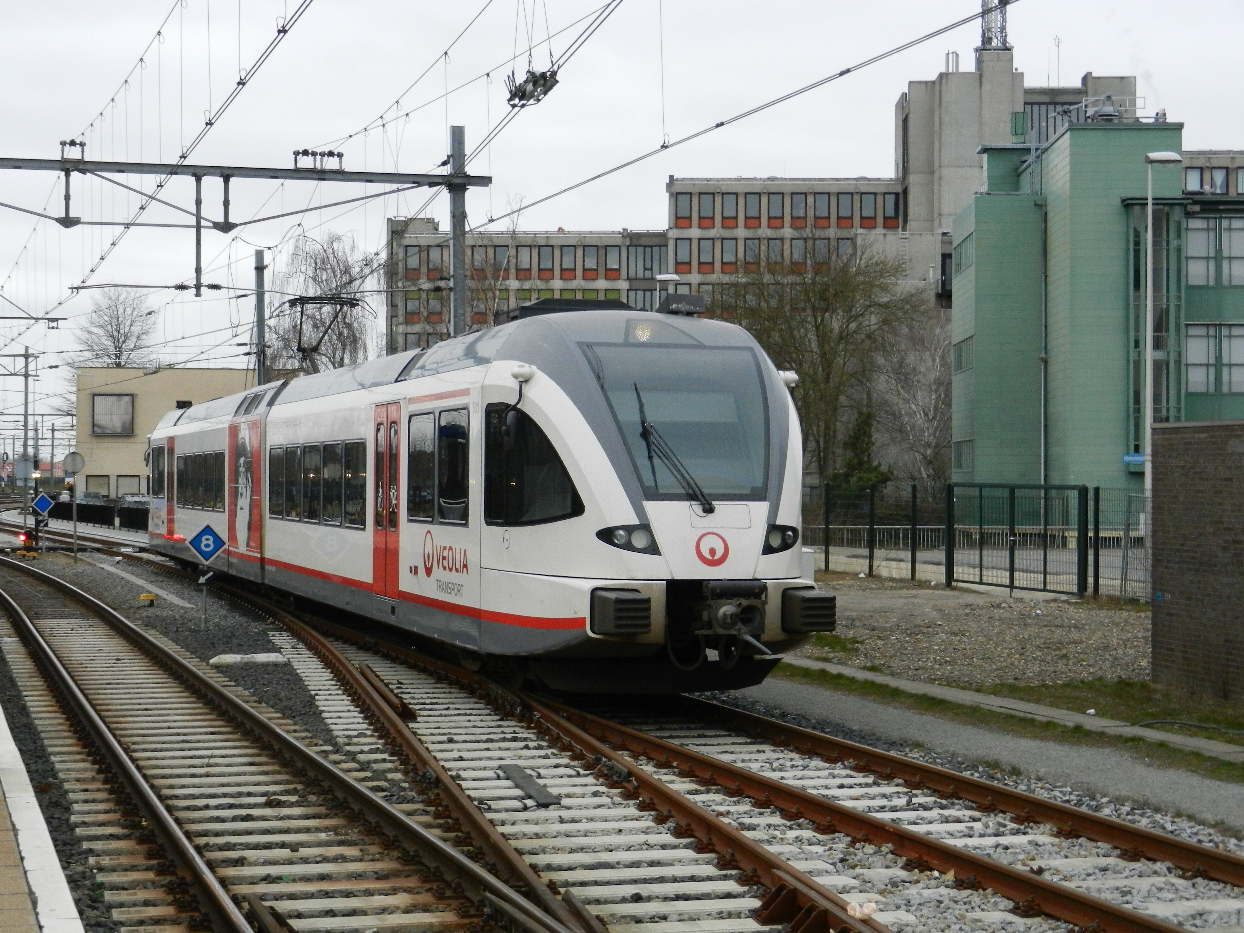 Ein Zug von Verlia Transport in Heerlen